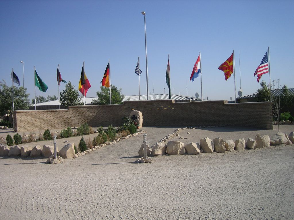 Ehrenhain Deutsche Gedenkstätte im Feldlager Kunduz Afghanistan